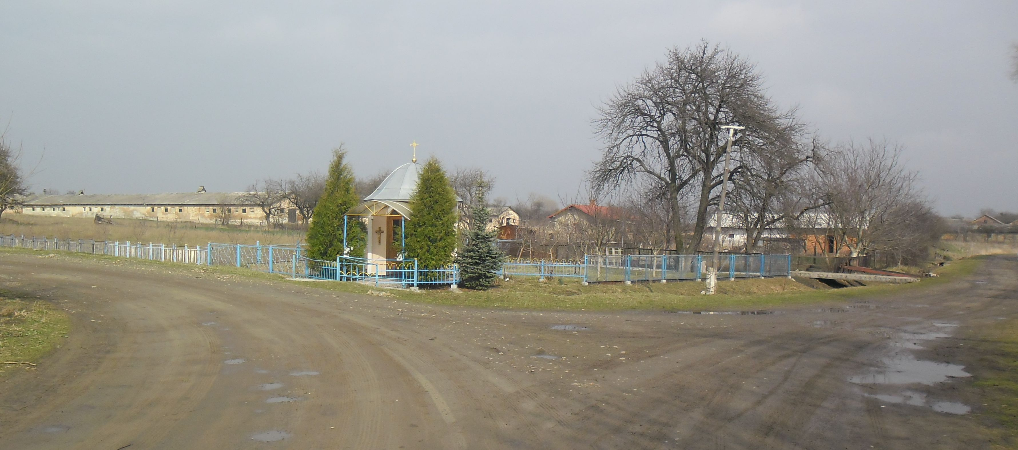 В.Полюхів.Каплиця при роздоріжжі до Розворян і Альфредувкі